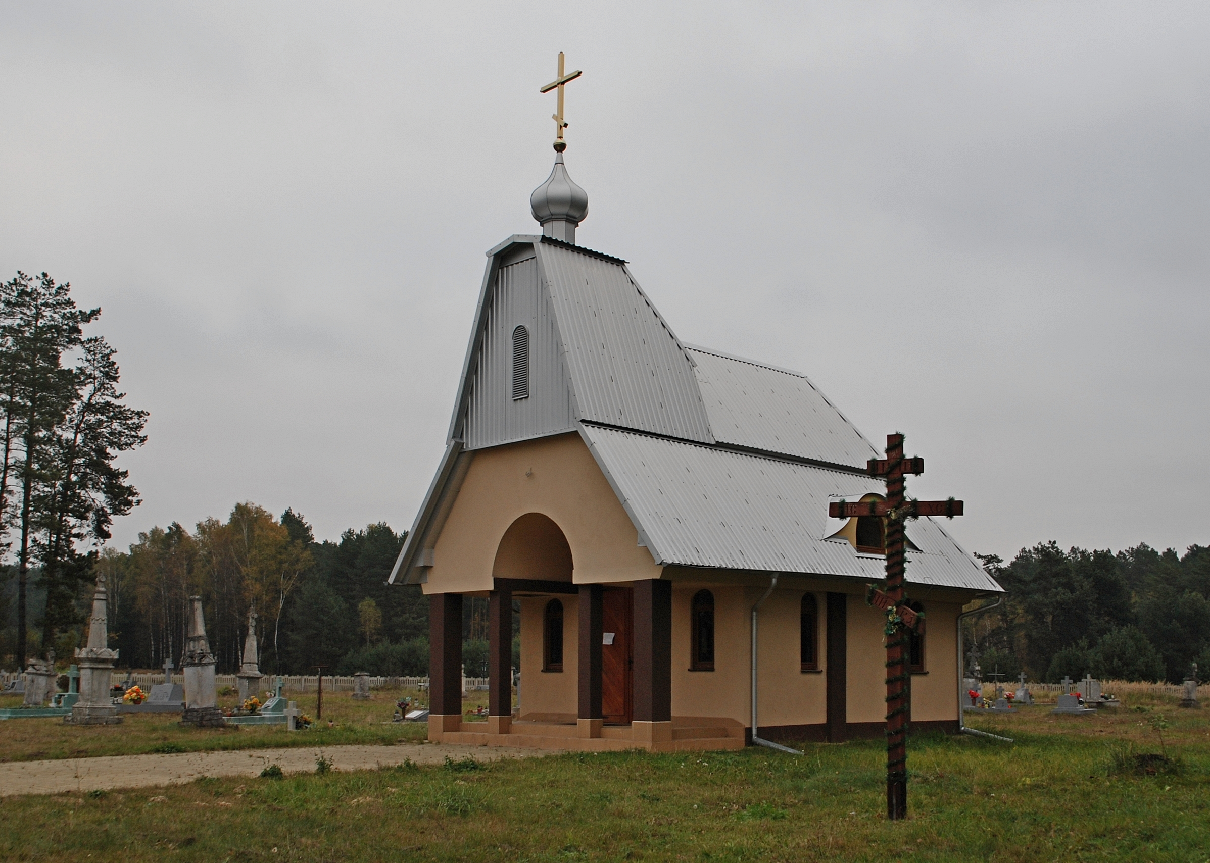 wieś Łosiniec